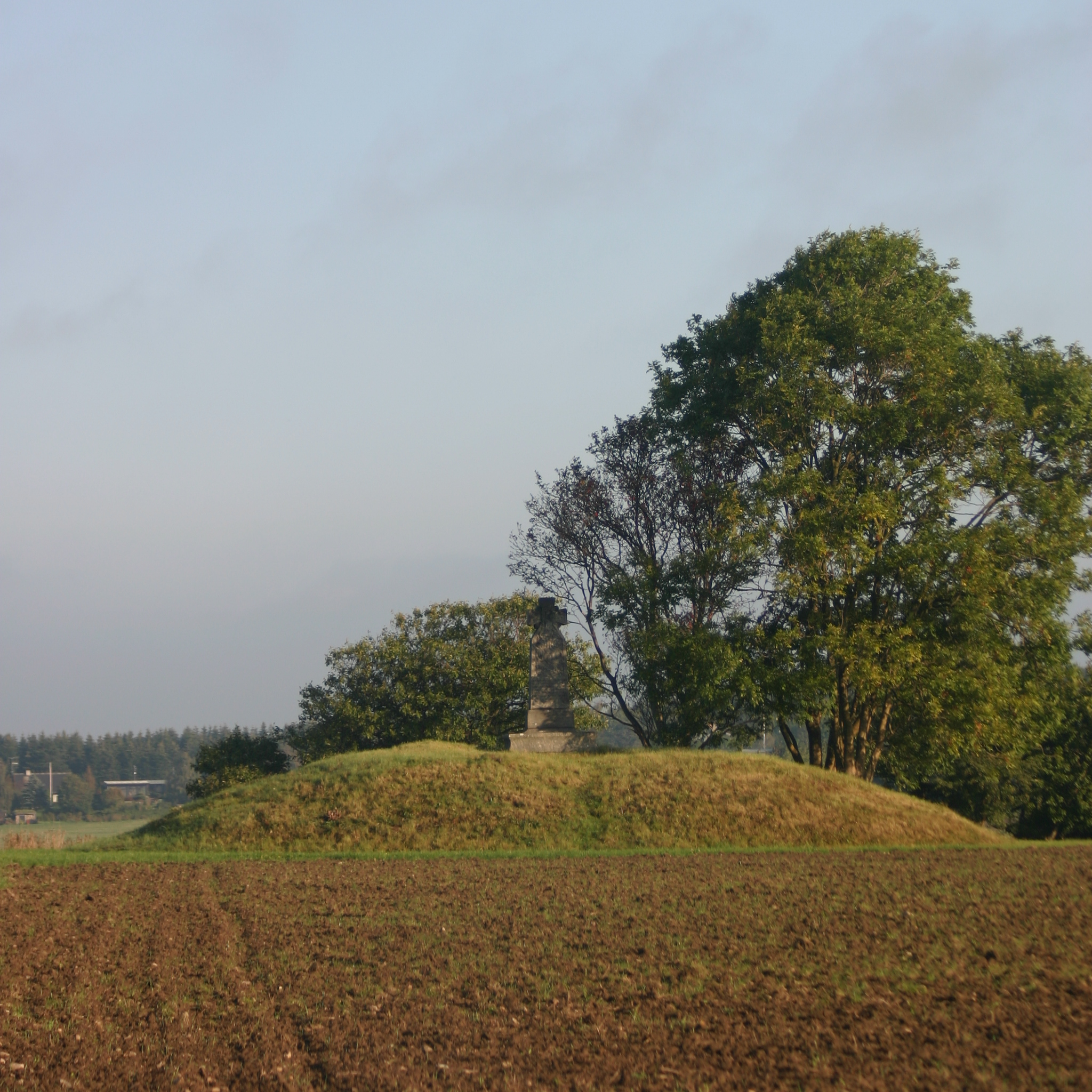 Snubbekorset near Vridsløsemagle, Denmark